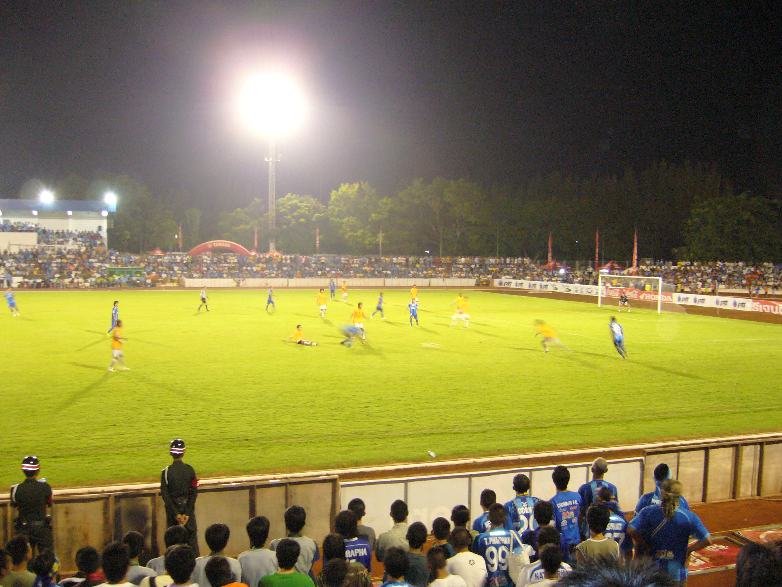 CFC vs Samut